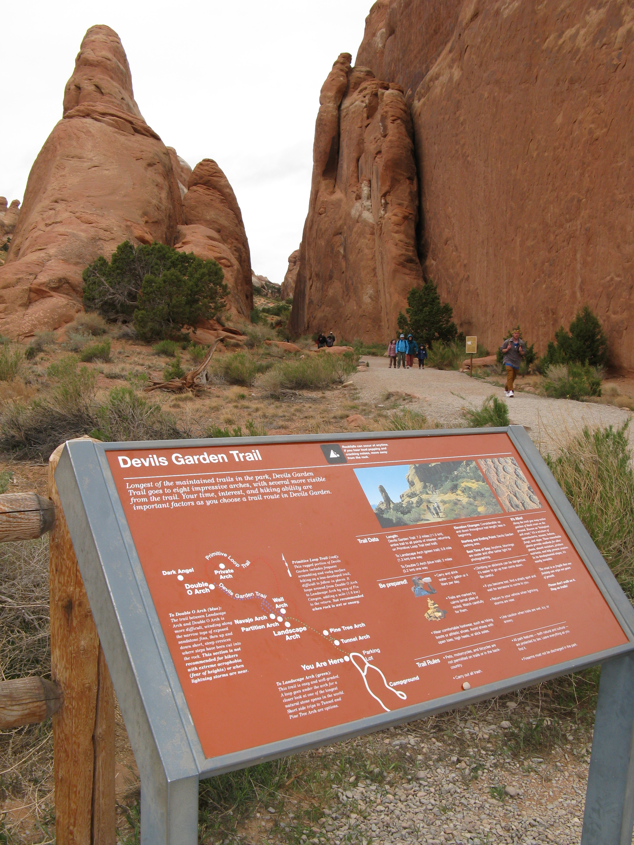 Devils Garden trail